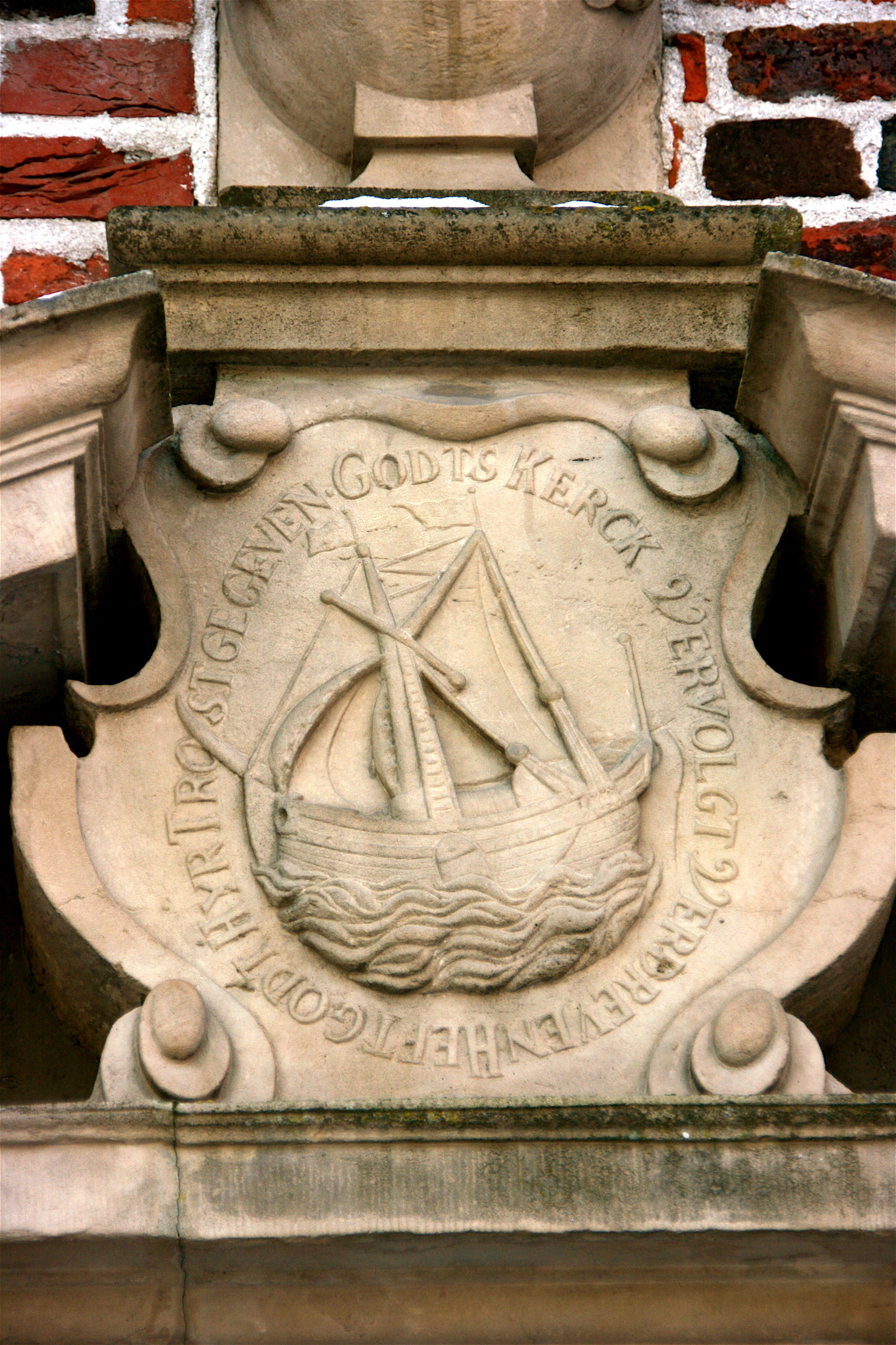 Das sogenannte „Schepken Christi“ am Ostportal der Großen Kirche in Emden